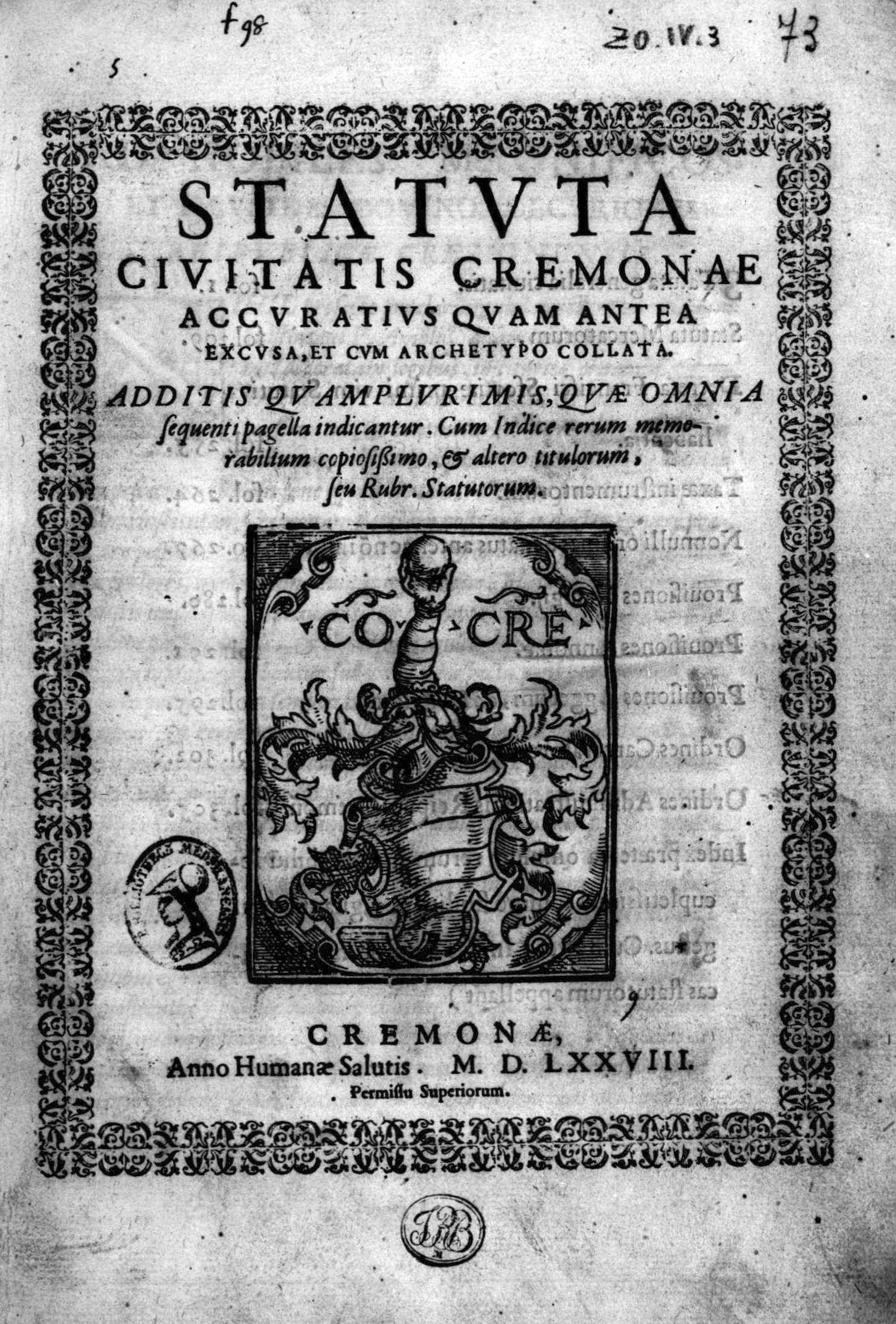 Frontespizio